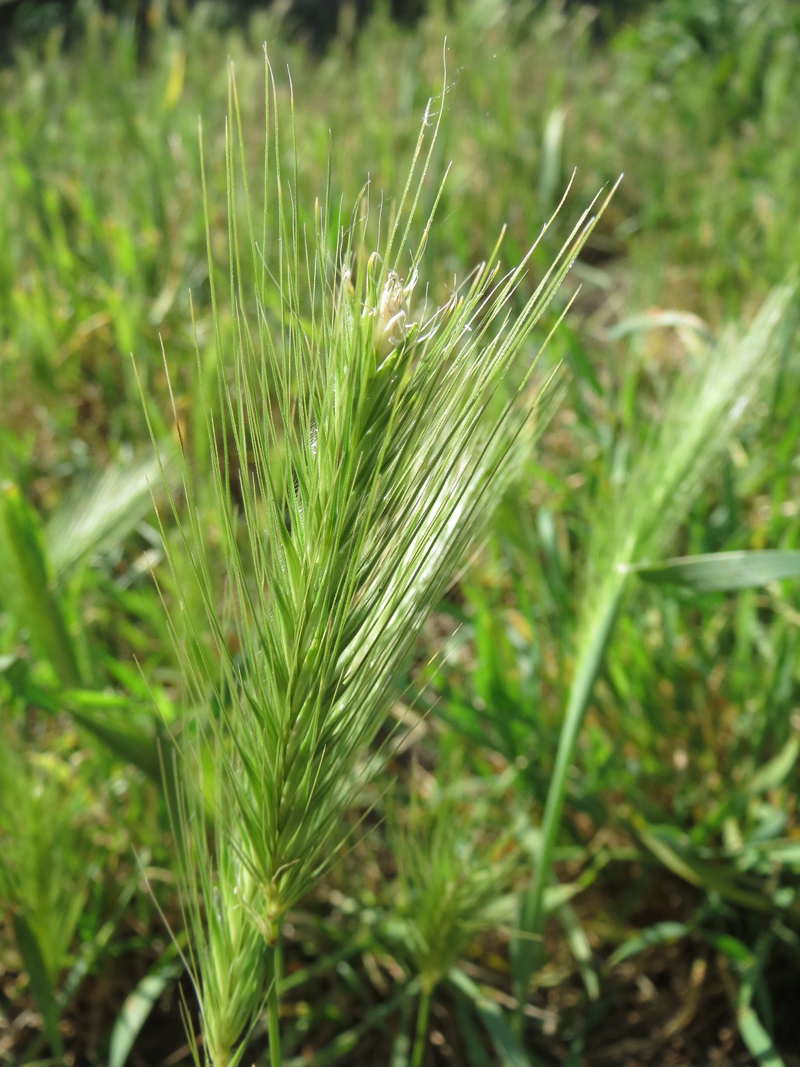 Mäuse-Gerste (Hordeum murinum) im Landschaftsschutzgebiet Hockenheimer Rheinbogen